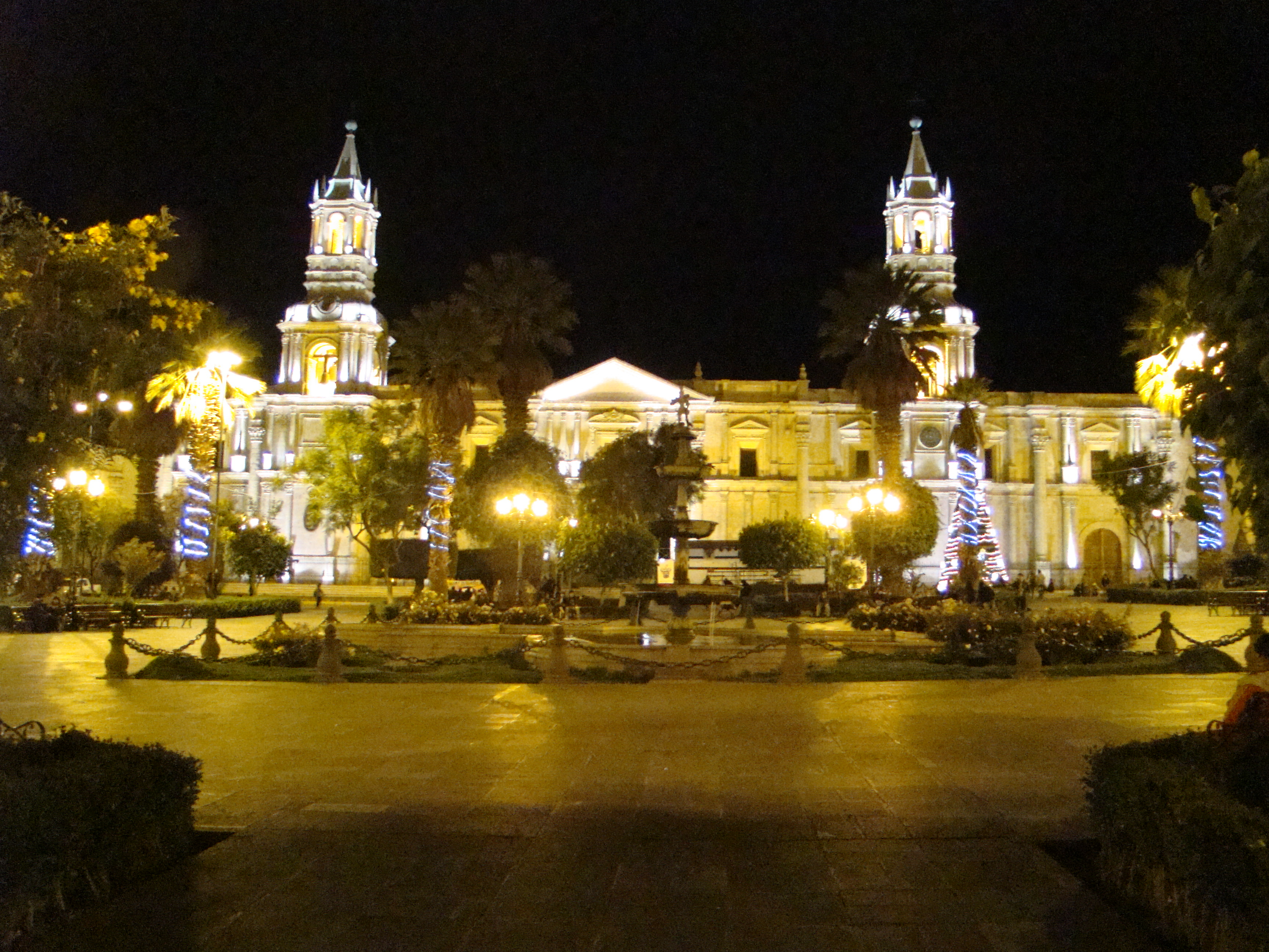 Fotografía panorámica de la Basílica Catedral de Arequipa.